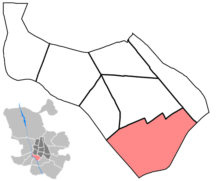 Mapa del barrio de Legazpi. Arganzuela. Madrid. España